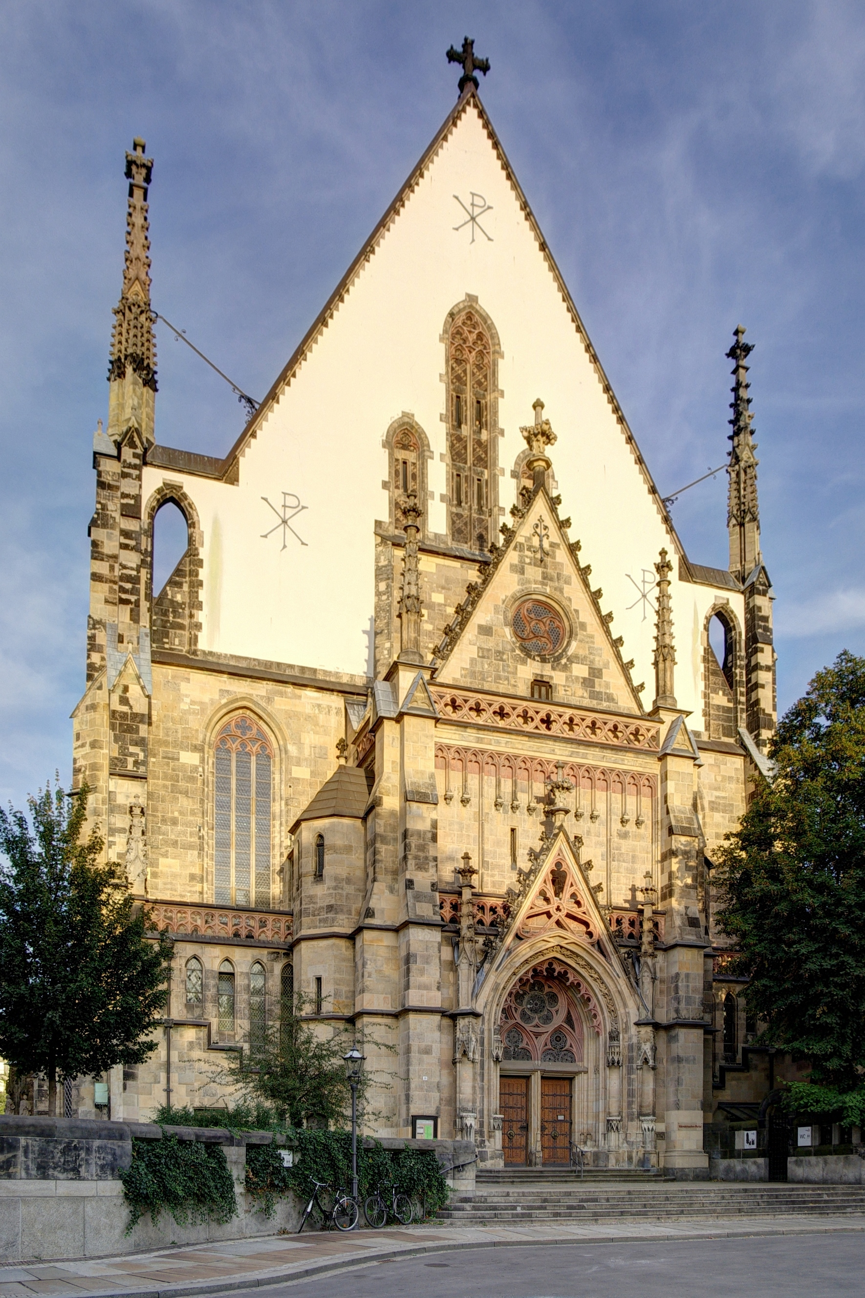 Leipzig, Thomaskirche, Westfassade